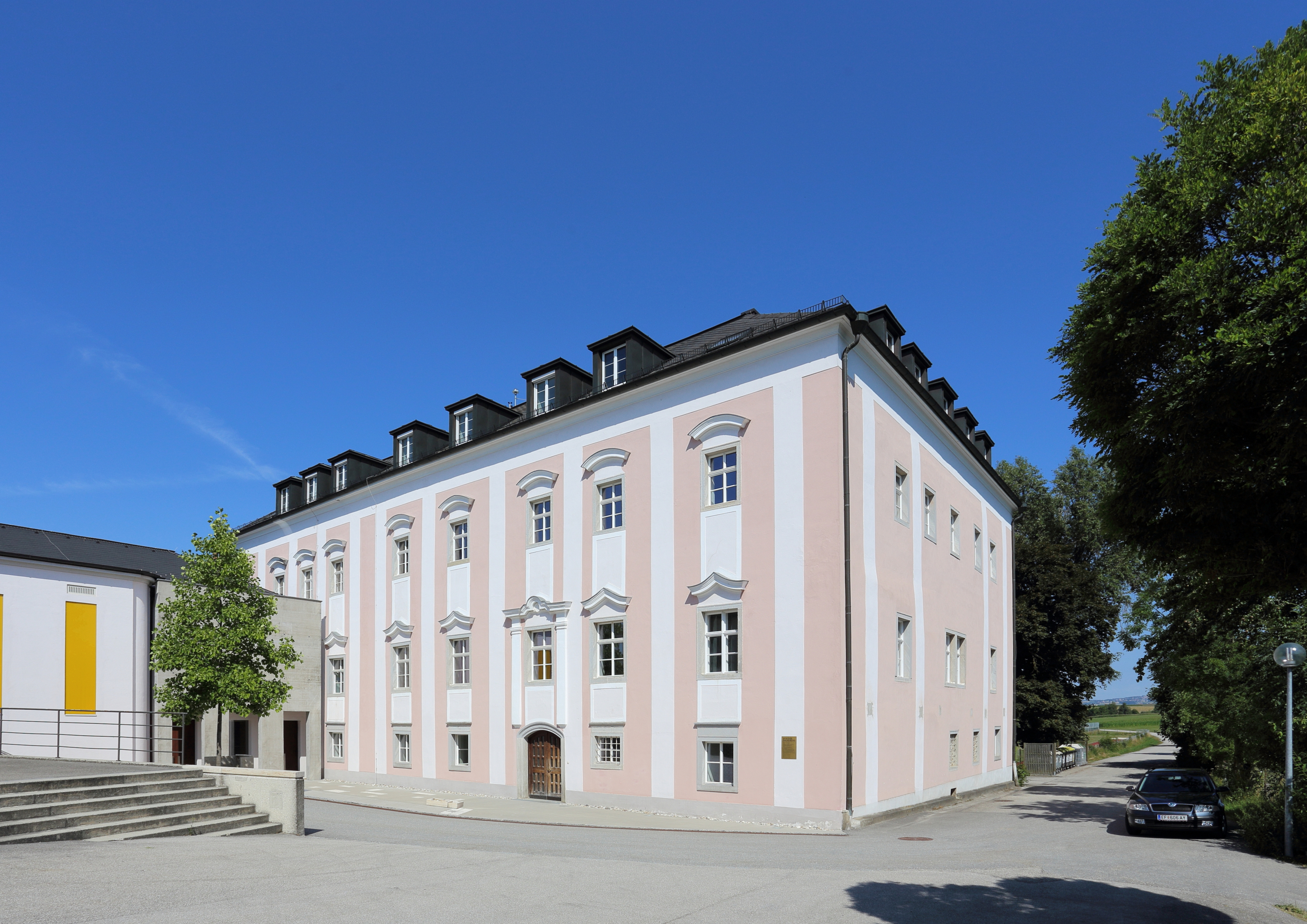 Ehemaliges Schloss in Dachsberg, ein Ortsteil der oberösterreichischen Gemeinde Prambachkirchen. Das Schloss Dachsberg wurde nach einem Brand 1672 wieder aufgebaut, im 18. Jahrhundert neu fassadiert und dient seit 1921 als Schulgebäude.